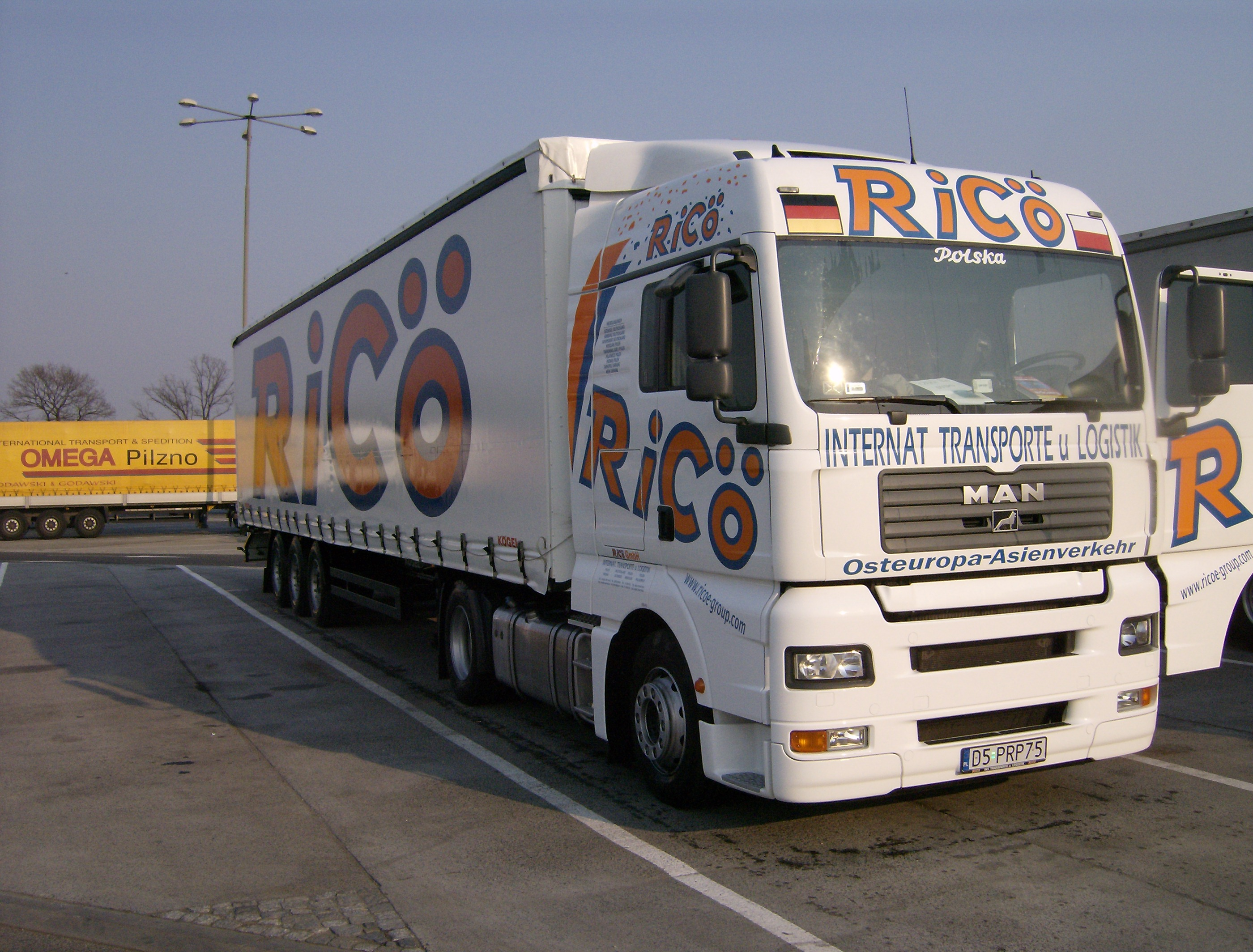 MAN TGA 440